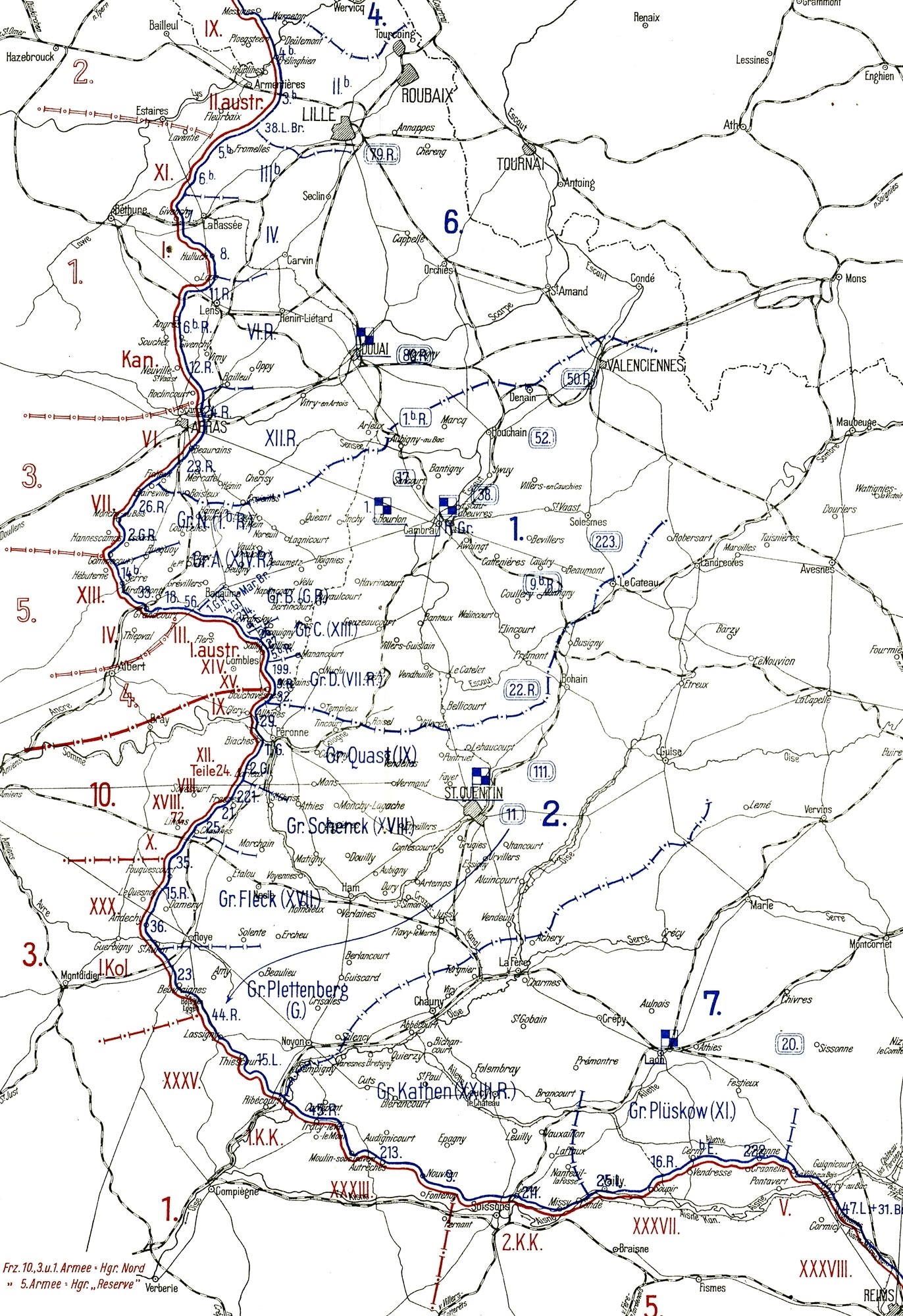 Das Infanterie-Regiment Nr. 390 im Verband der 211. Infanterie-Division am 1. Januar 1917 in den Stellungskämpfen an der Aisne.